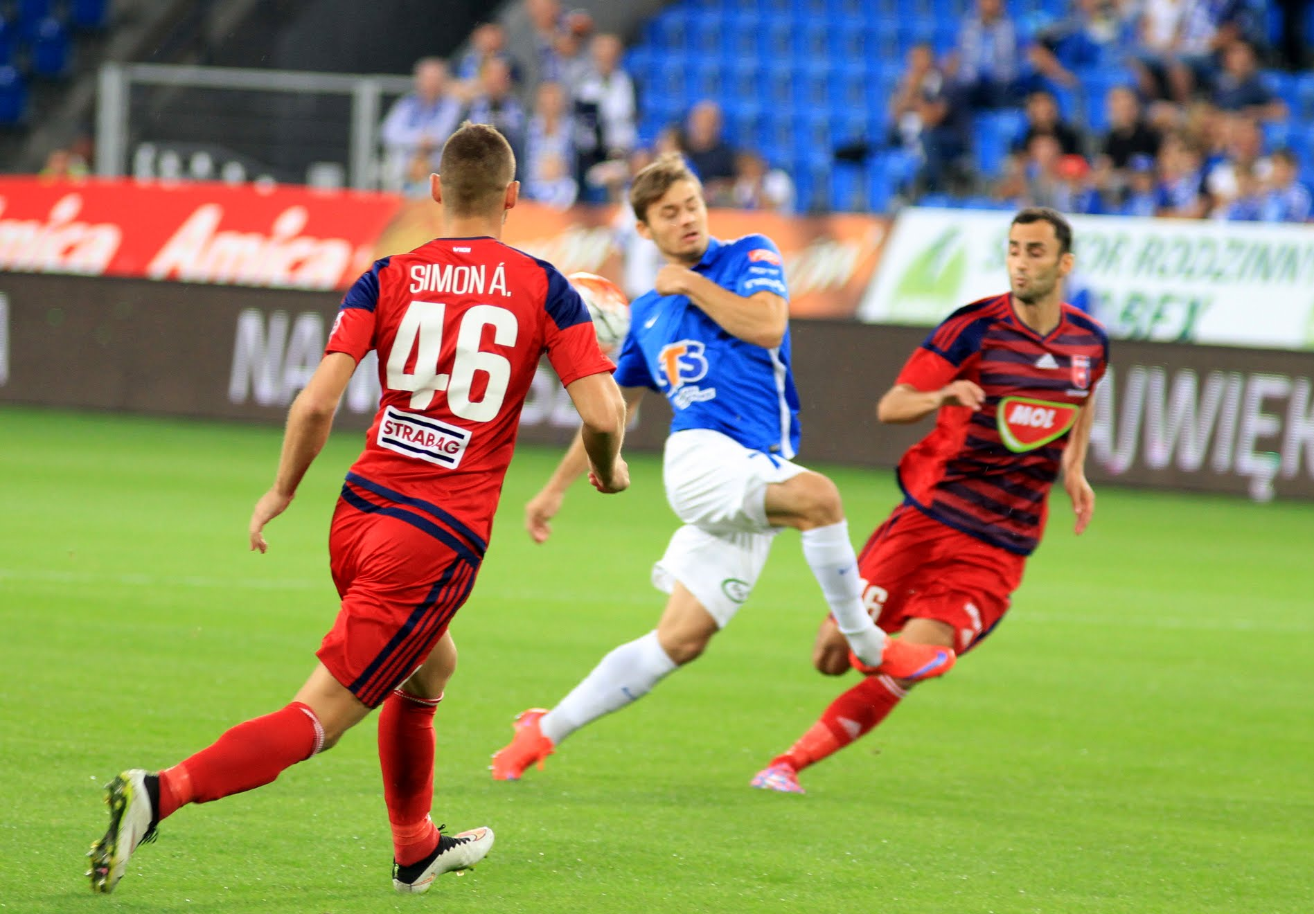 Karol Linetty w meczu Lech Poznań - Videoton FC, Inea Stadion, Poznań